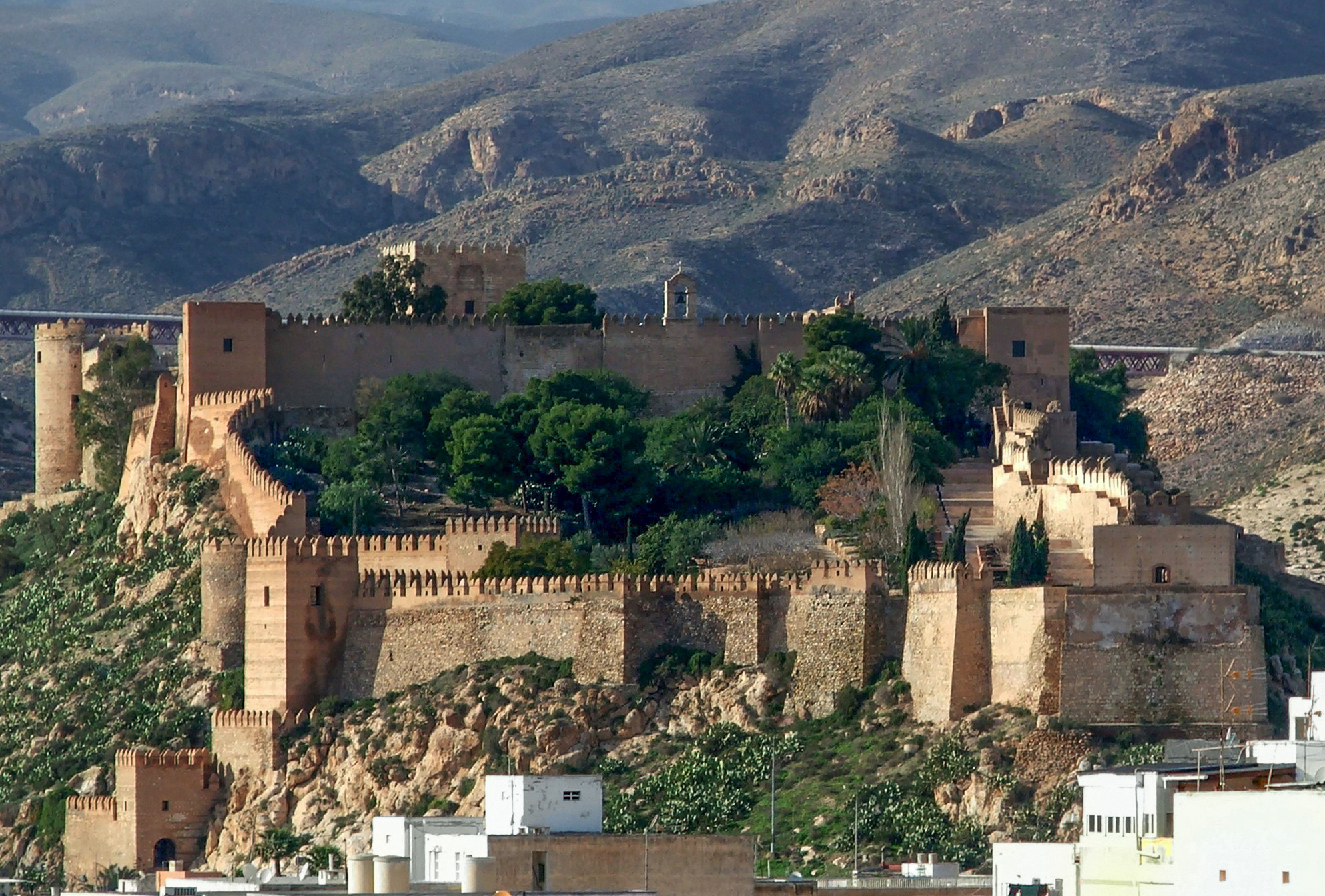 Fotografía de la Alcazaba de Almería, Andalucía, España, tomada desde el este, con vista al primer recinto.